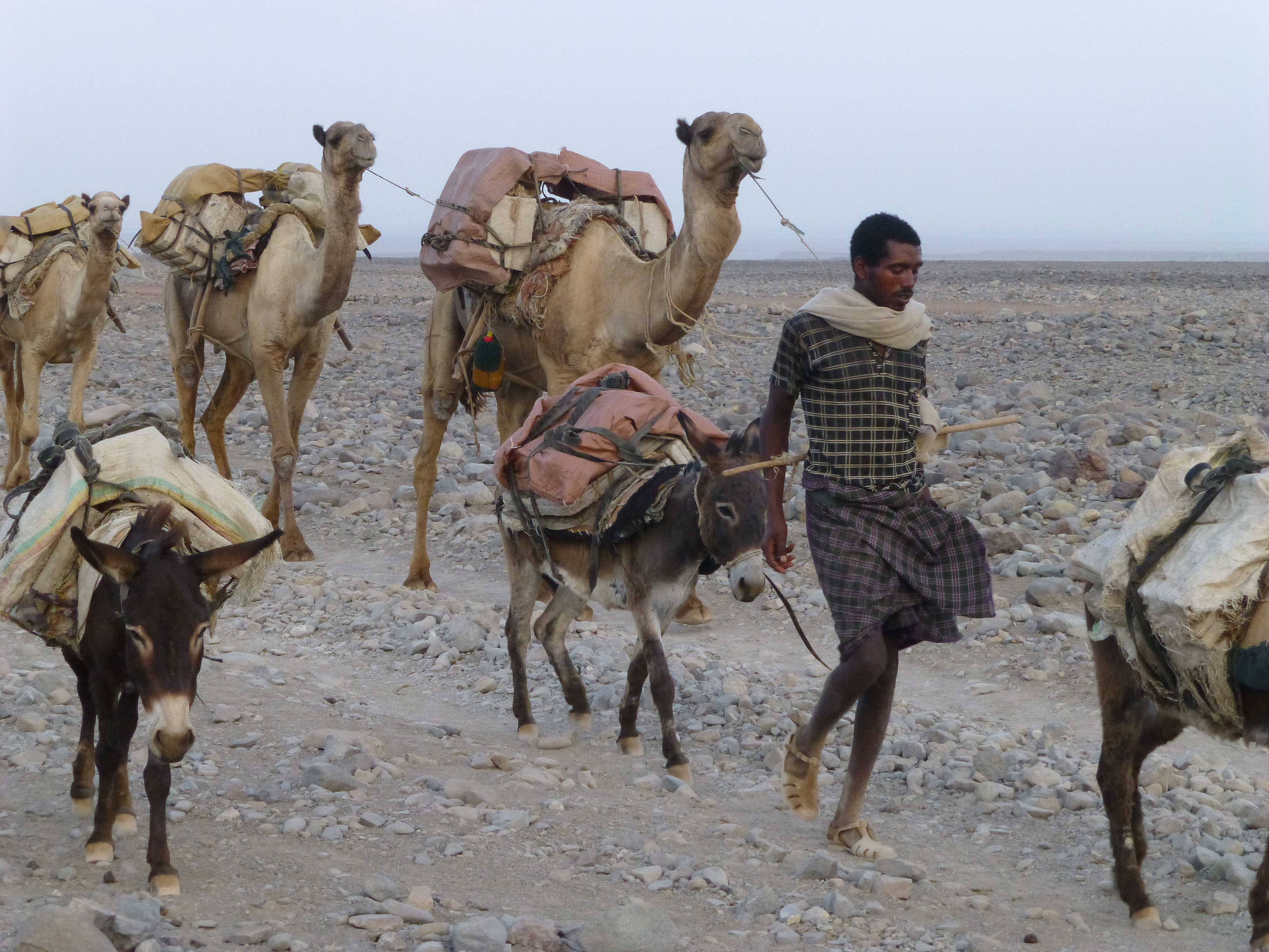 Ethiopie, région Afar, désert Danakil, entre Berhale et Ahmed Ela : caravane de sel